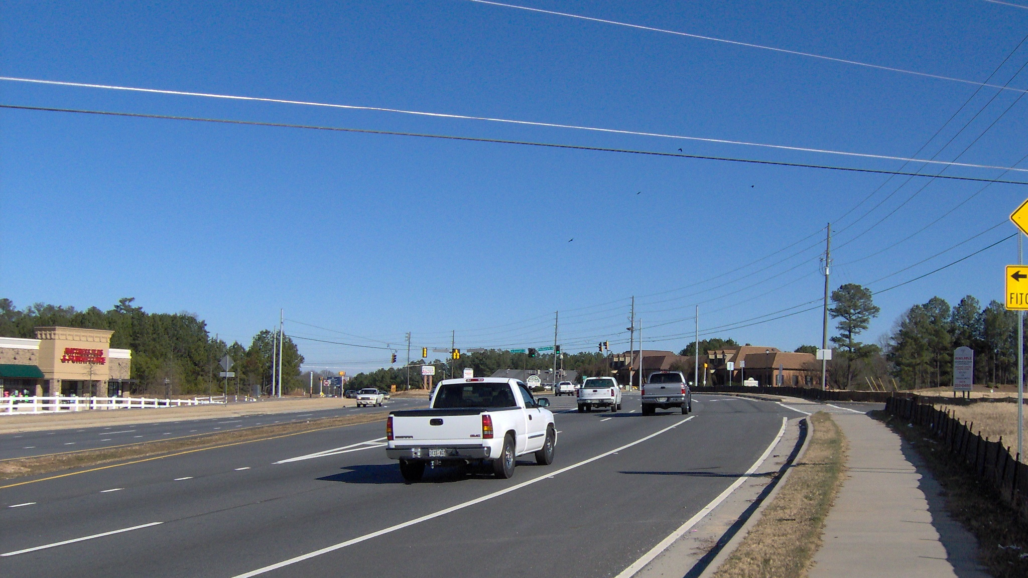 Woodstock GA